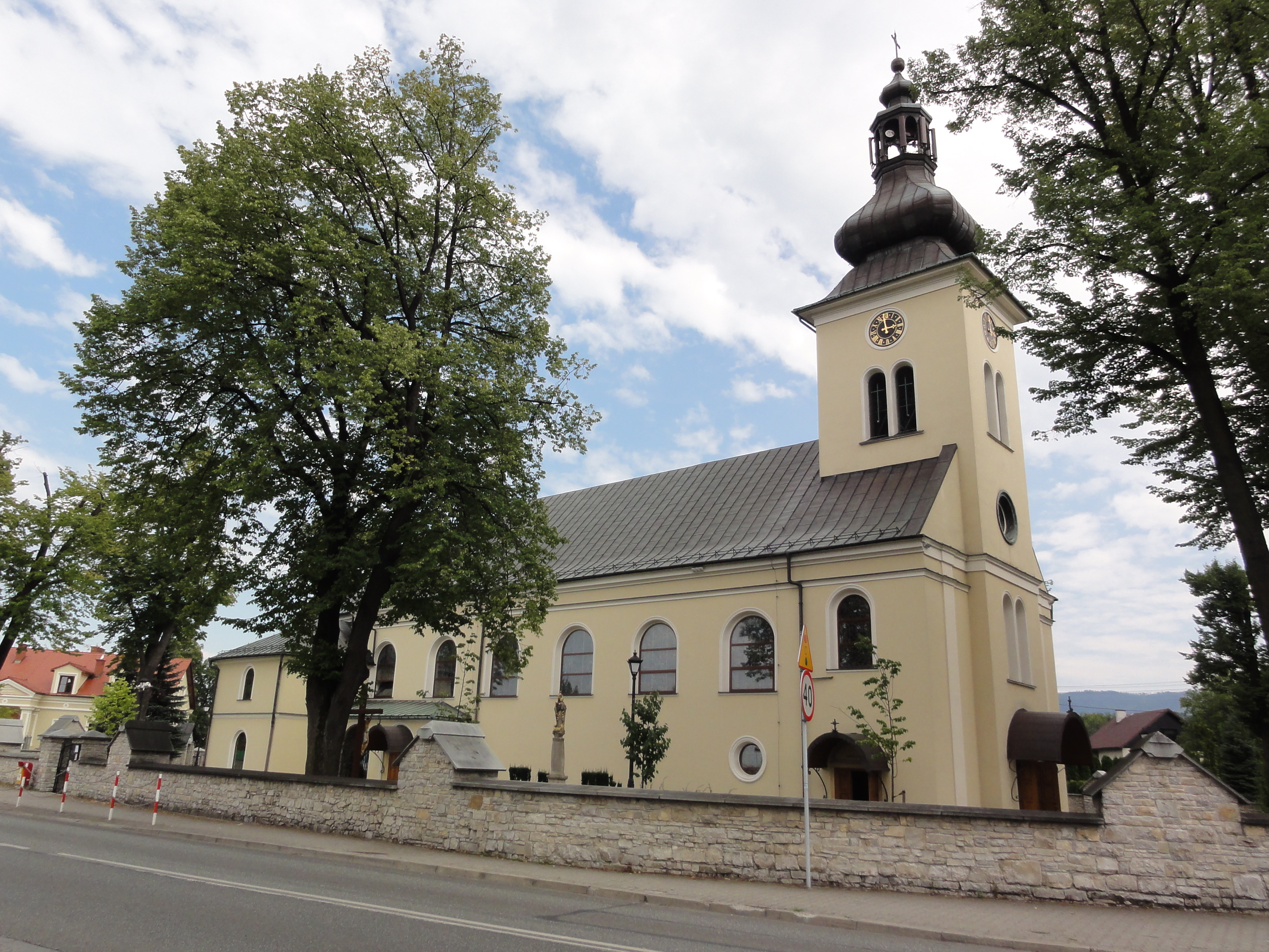 Kościół Nawiedzenia NMP w Bielsku-Białej-Hałcnowie (Sanktuarium Matki Bożej Bolesnej)